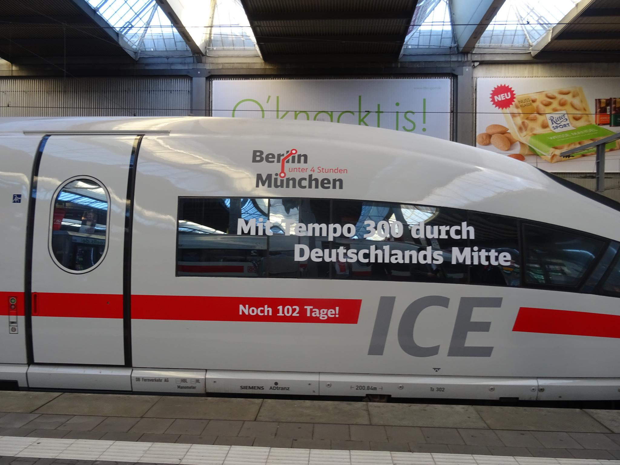 VDE8Pemiere